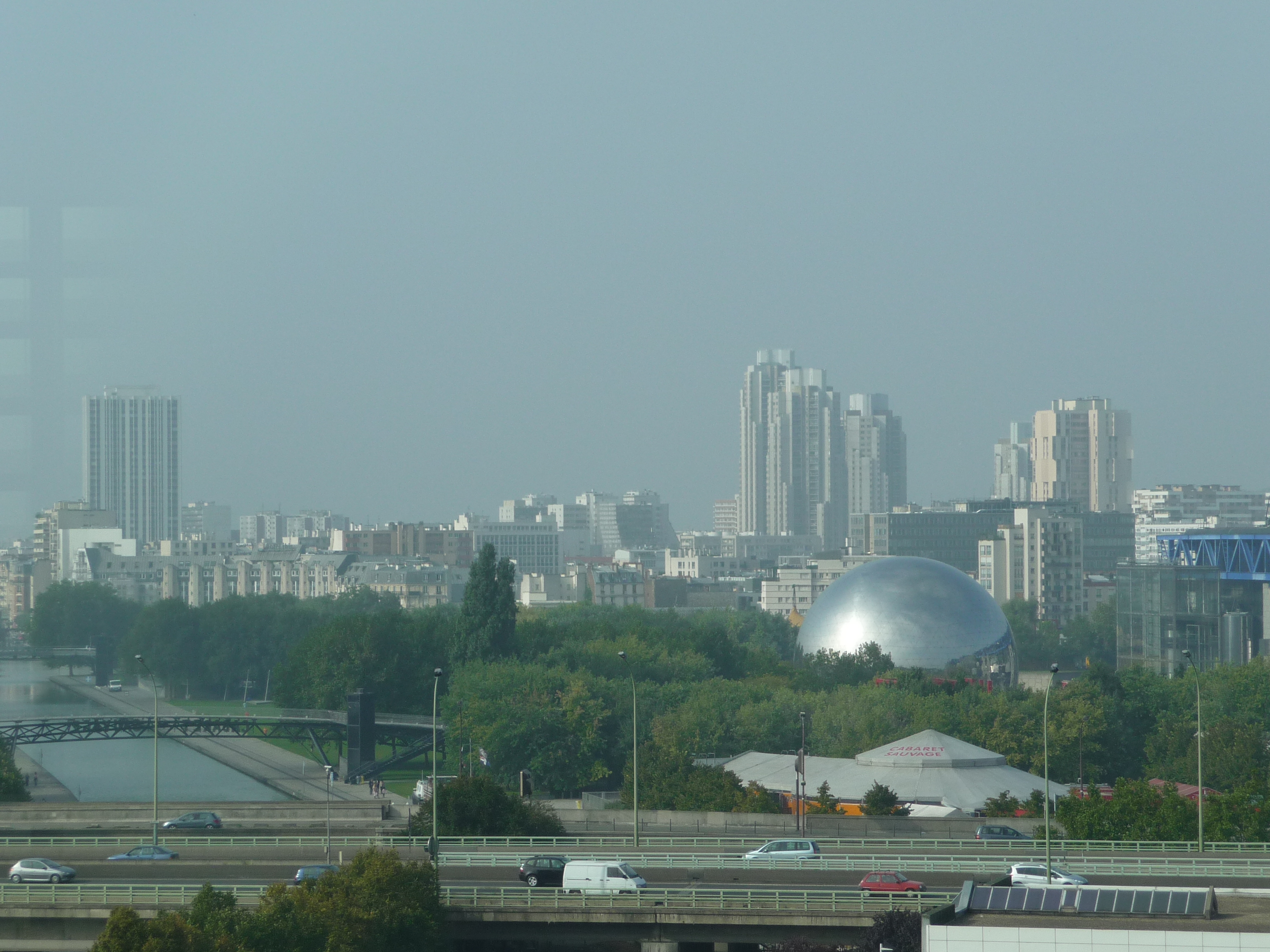 Le Cabaret Sauvage dans le Parc de la Villette (Paris)